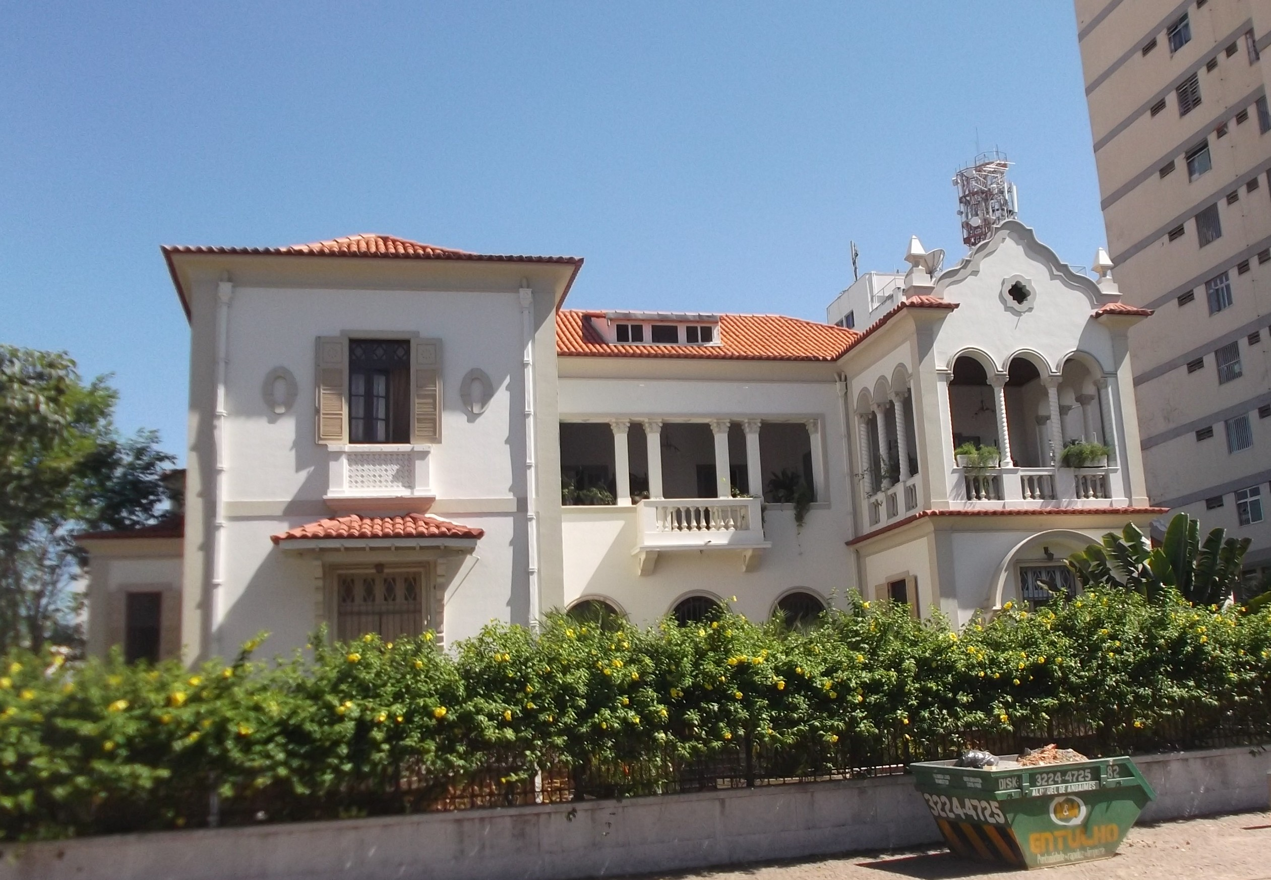 Palacete episcopal de Teresina, na Avenida Frei Serafim.